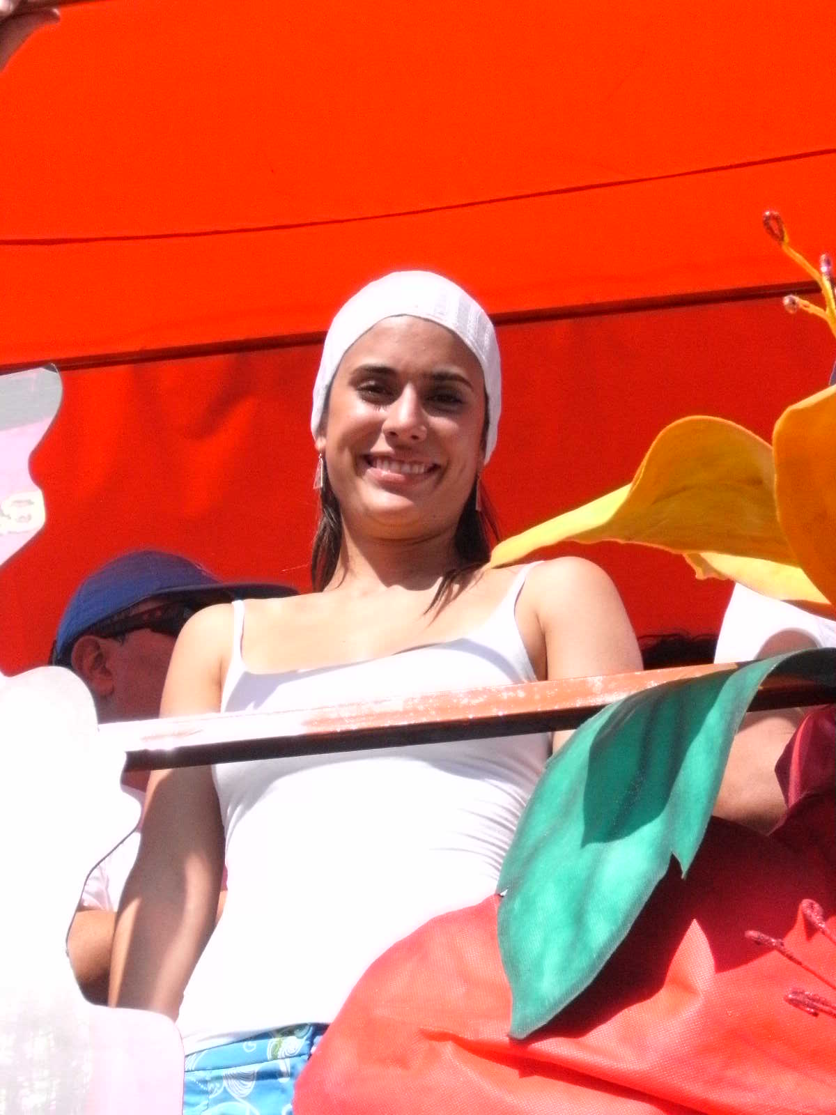 Carolina Ramírez